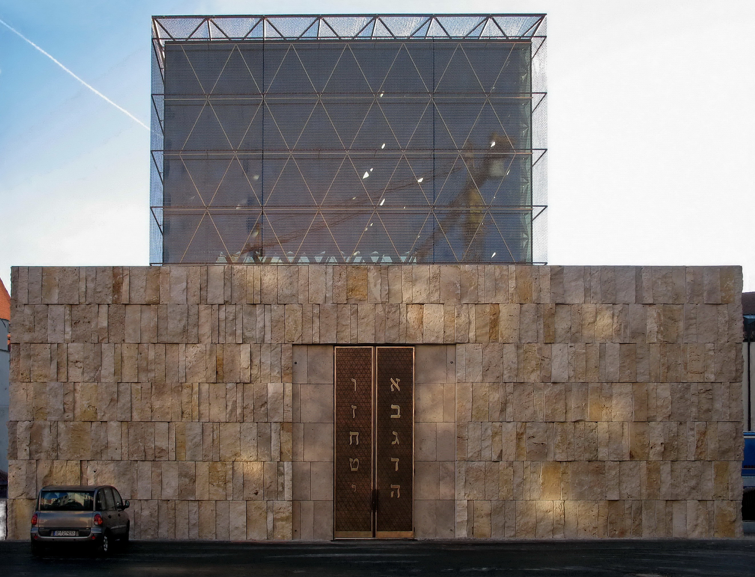 Jüdisches Zentrum München